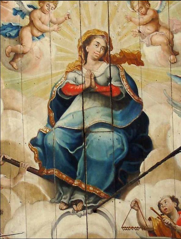 Nossa Senhora da Porciúncula - detalhe do teto da Igreja de S. Francisco em Ouro Preto